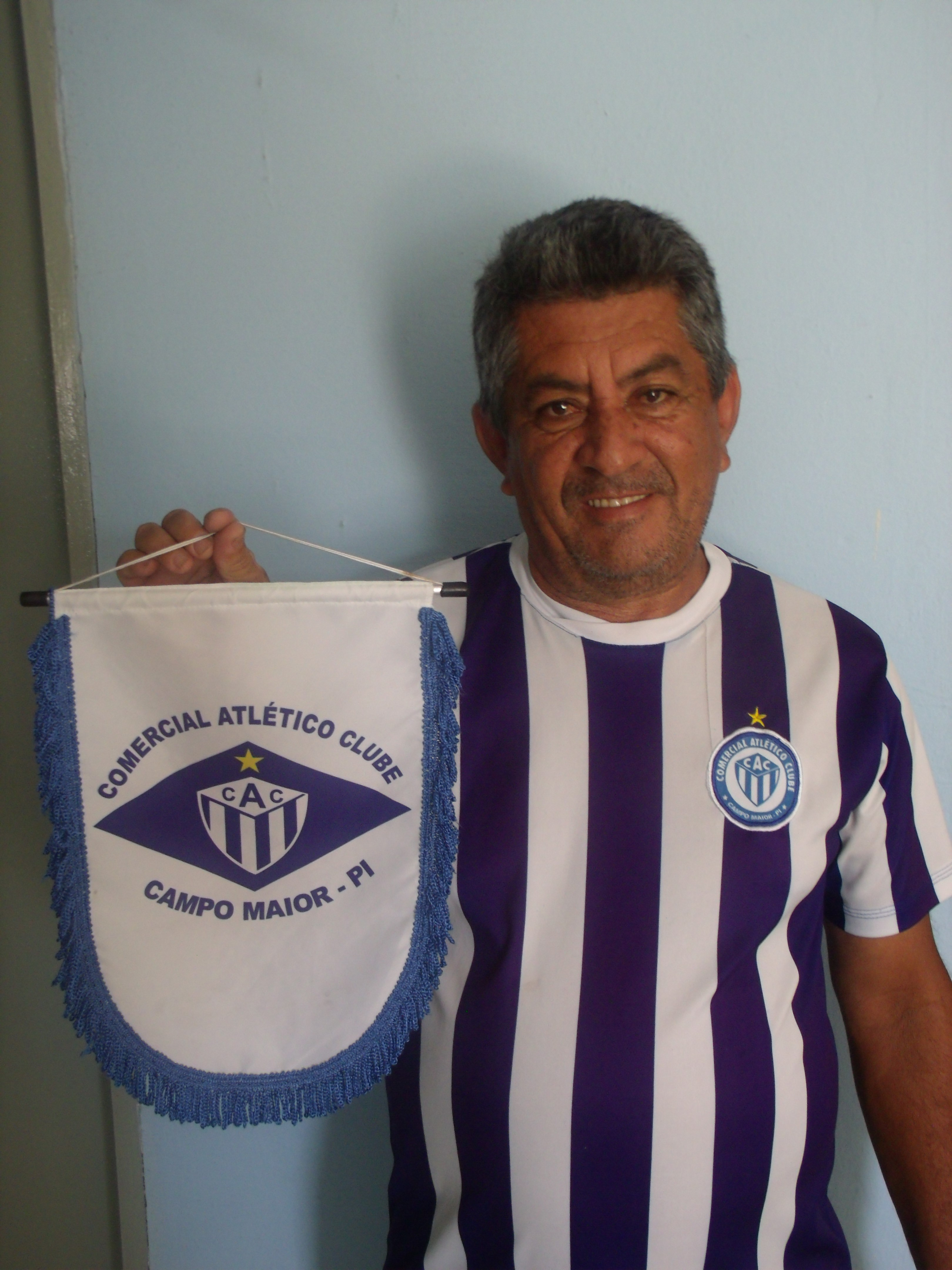 Senhor Luis Carlos,atual (2020) presidente do Comercial Atlético Clube.